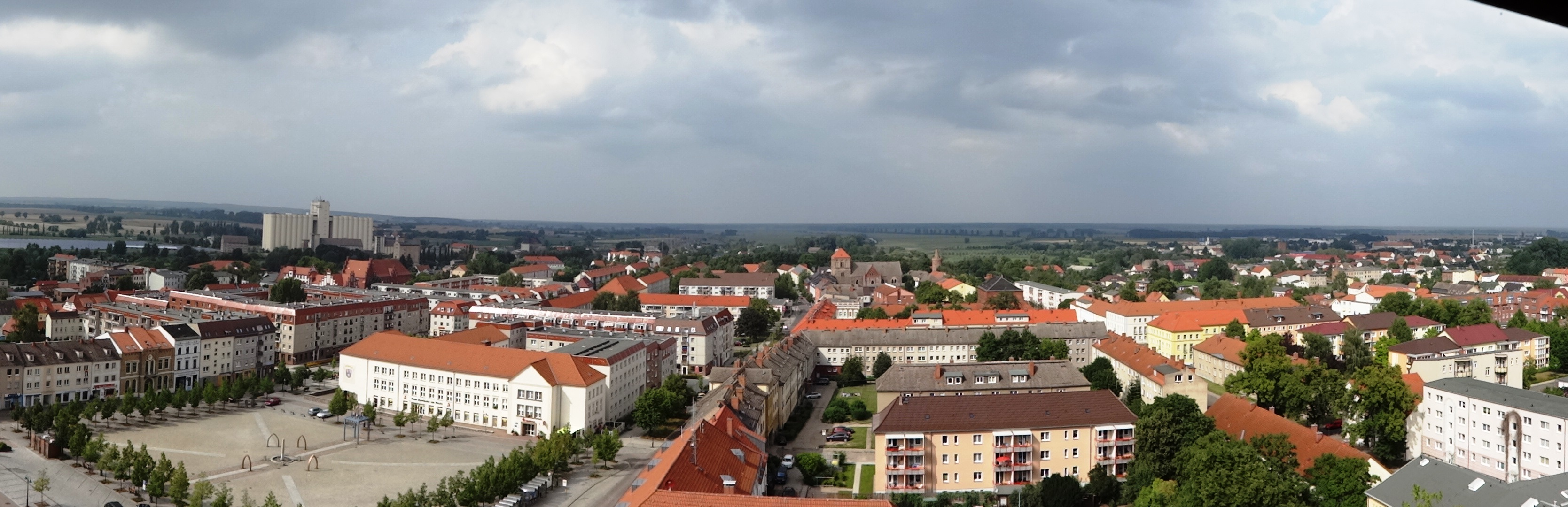 Aussicht von der Marienkirche in Pasewalk (Mecklenburg-Vorpommern) Richtung Markt